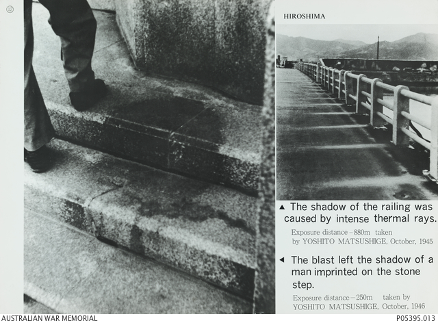 「人影の石」と萬代橋の影